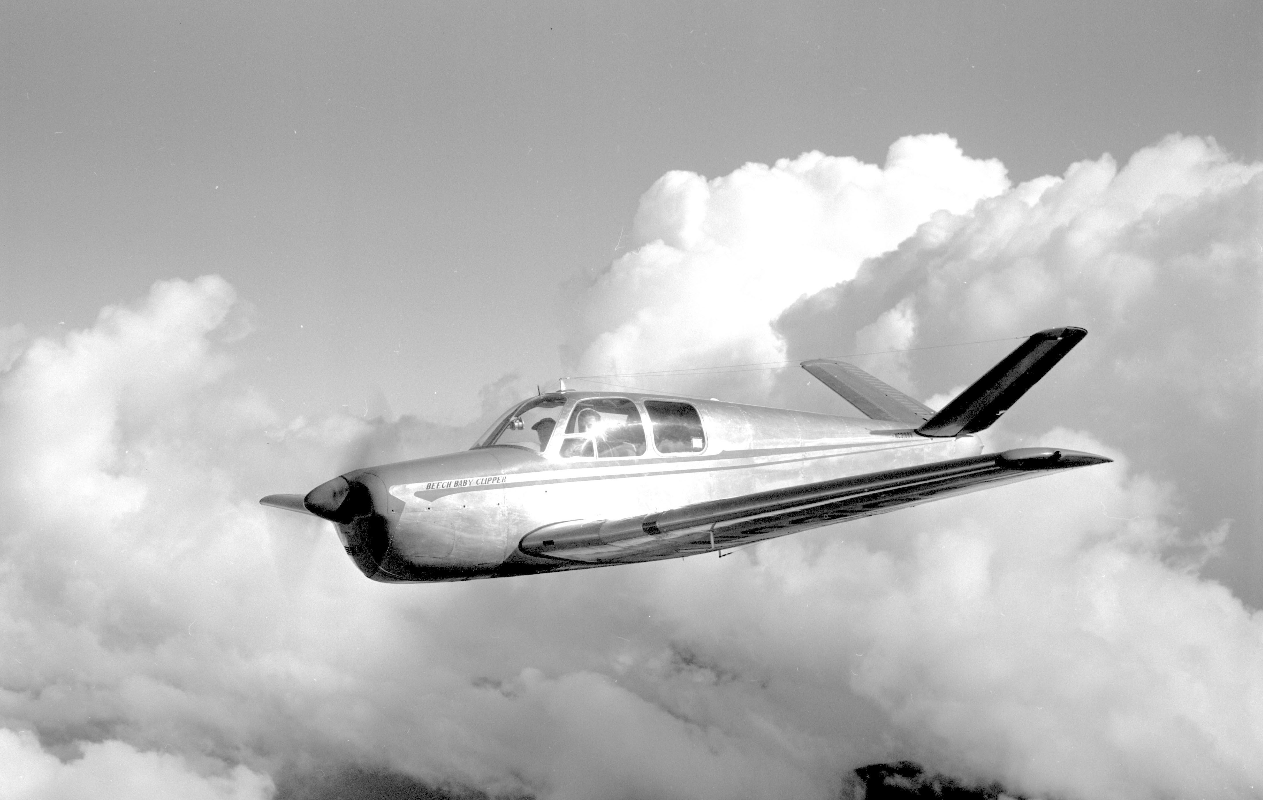 Beech 35 N3188V Jan1949